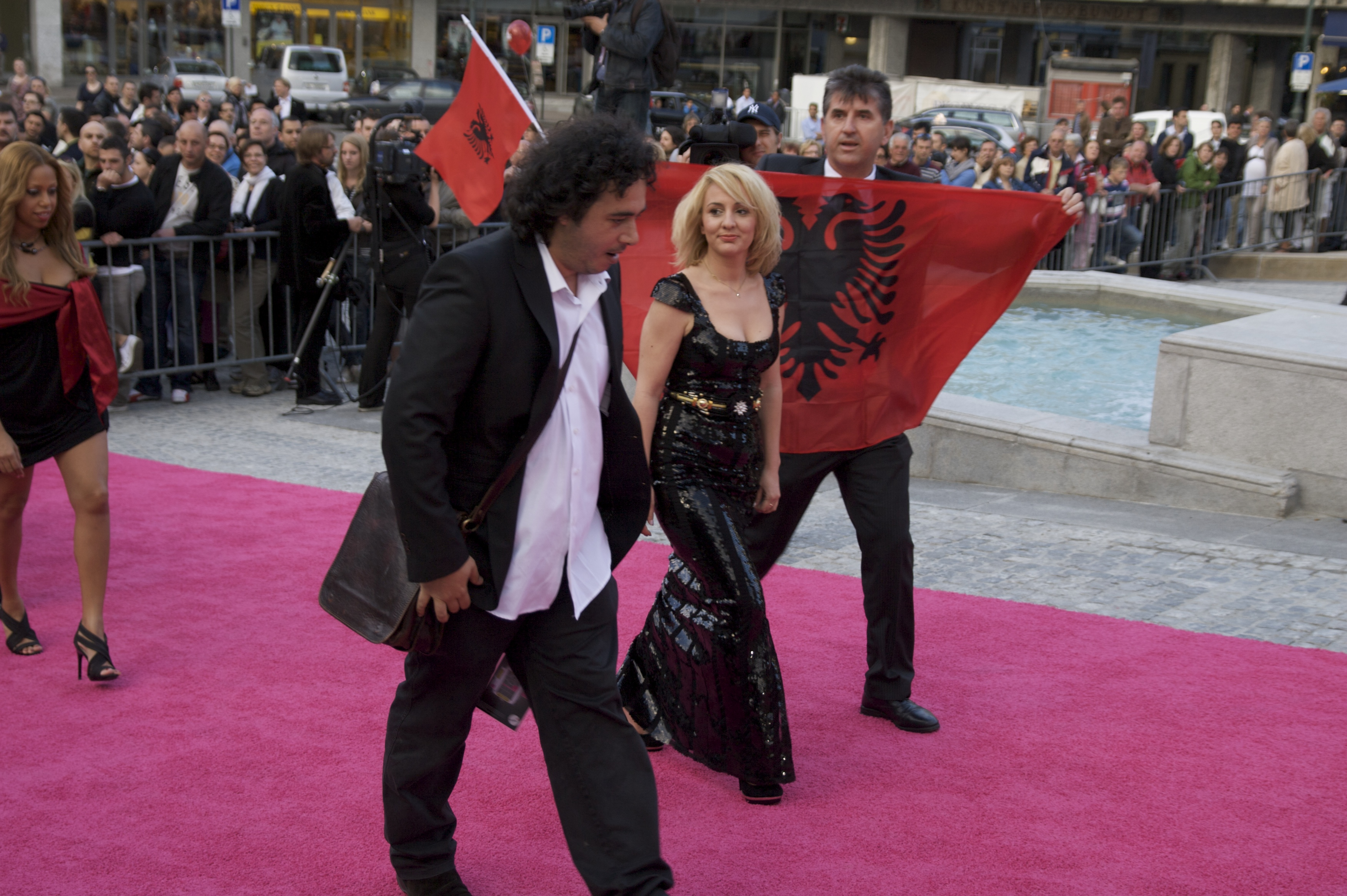 Foto: Vincent Hasselgård, Aktiv I Oslo.no